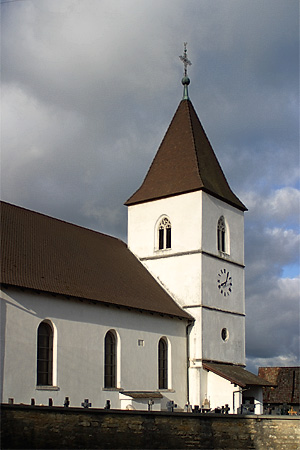 Pfarrkirche von Bure